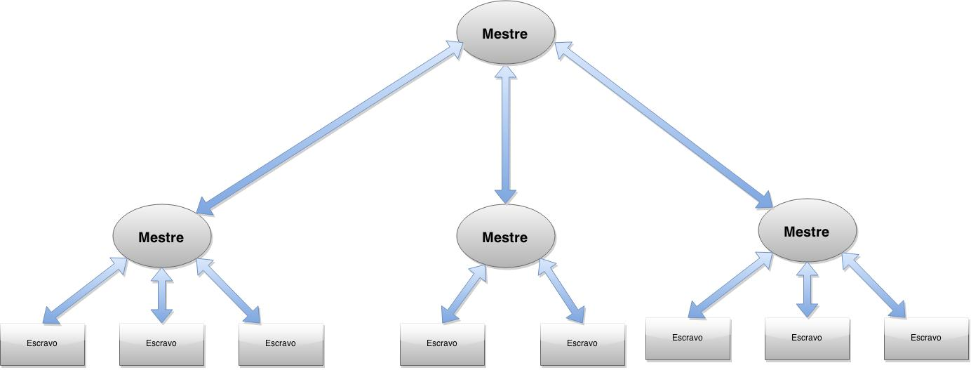 mestre escravo árbore